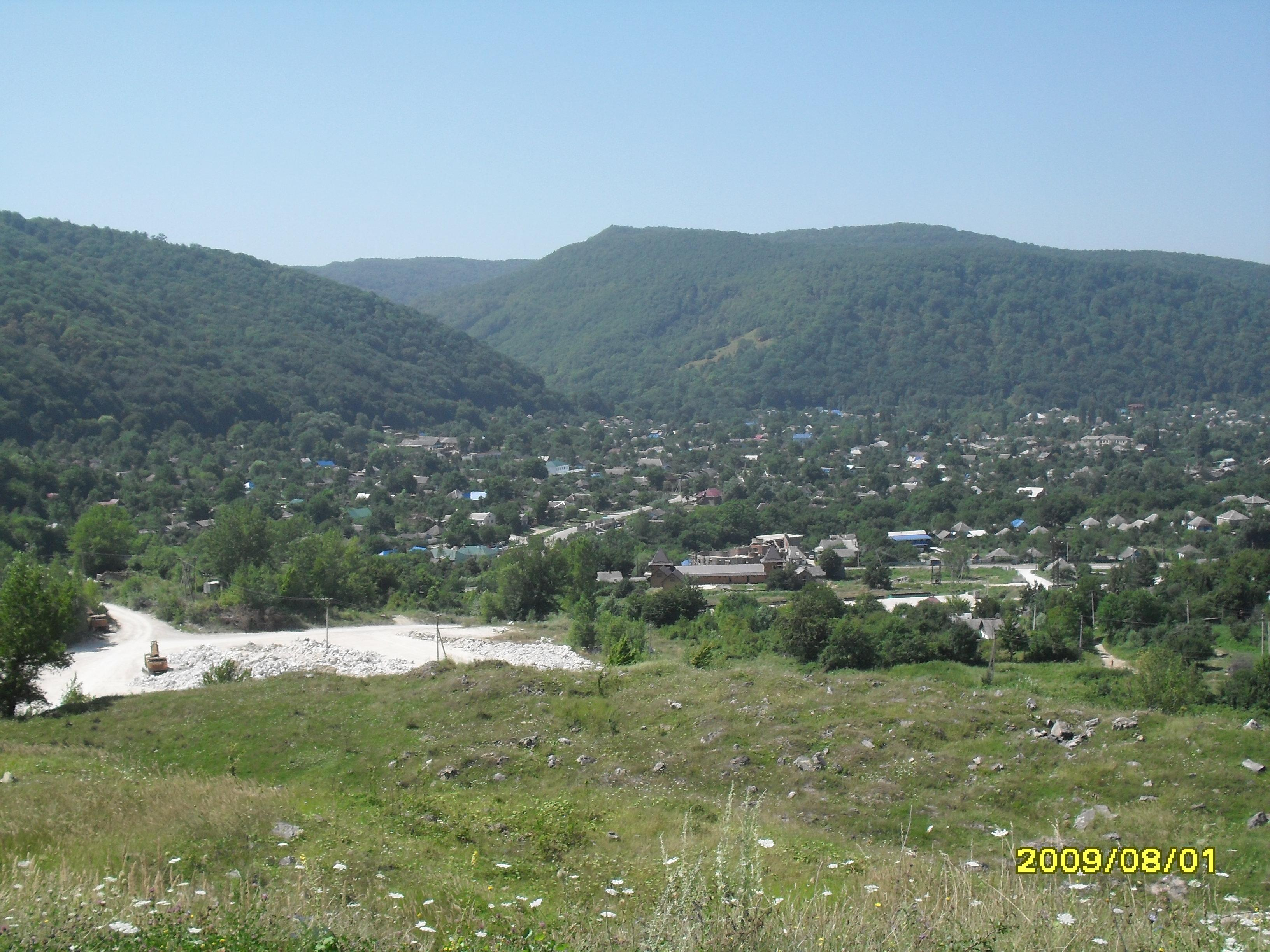 Vista de Kamennomostski en Adiguesia, sur de Rusia.